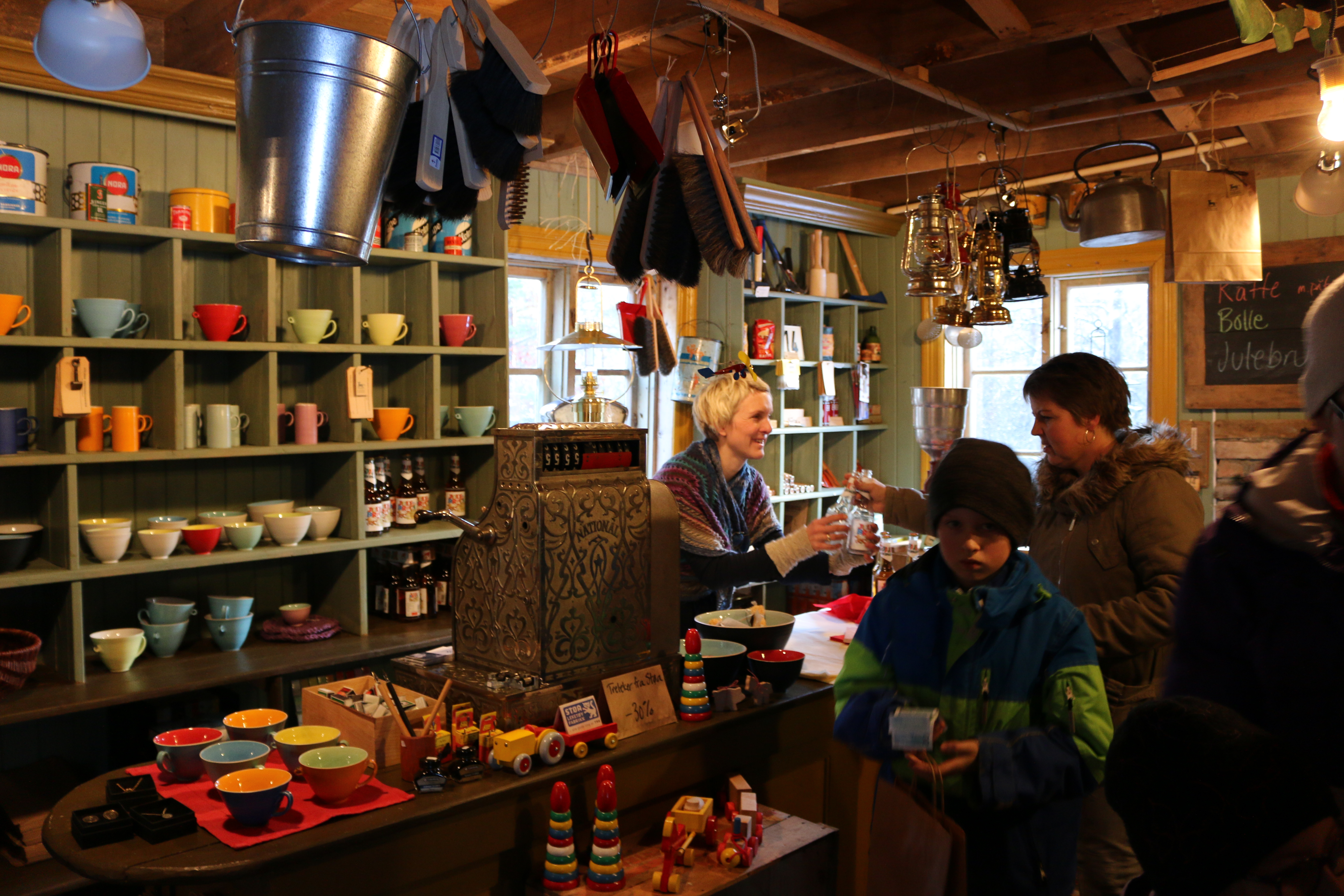 Bilde fra kramboden i kjelleren på fabrikken